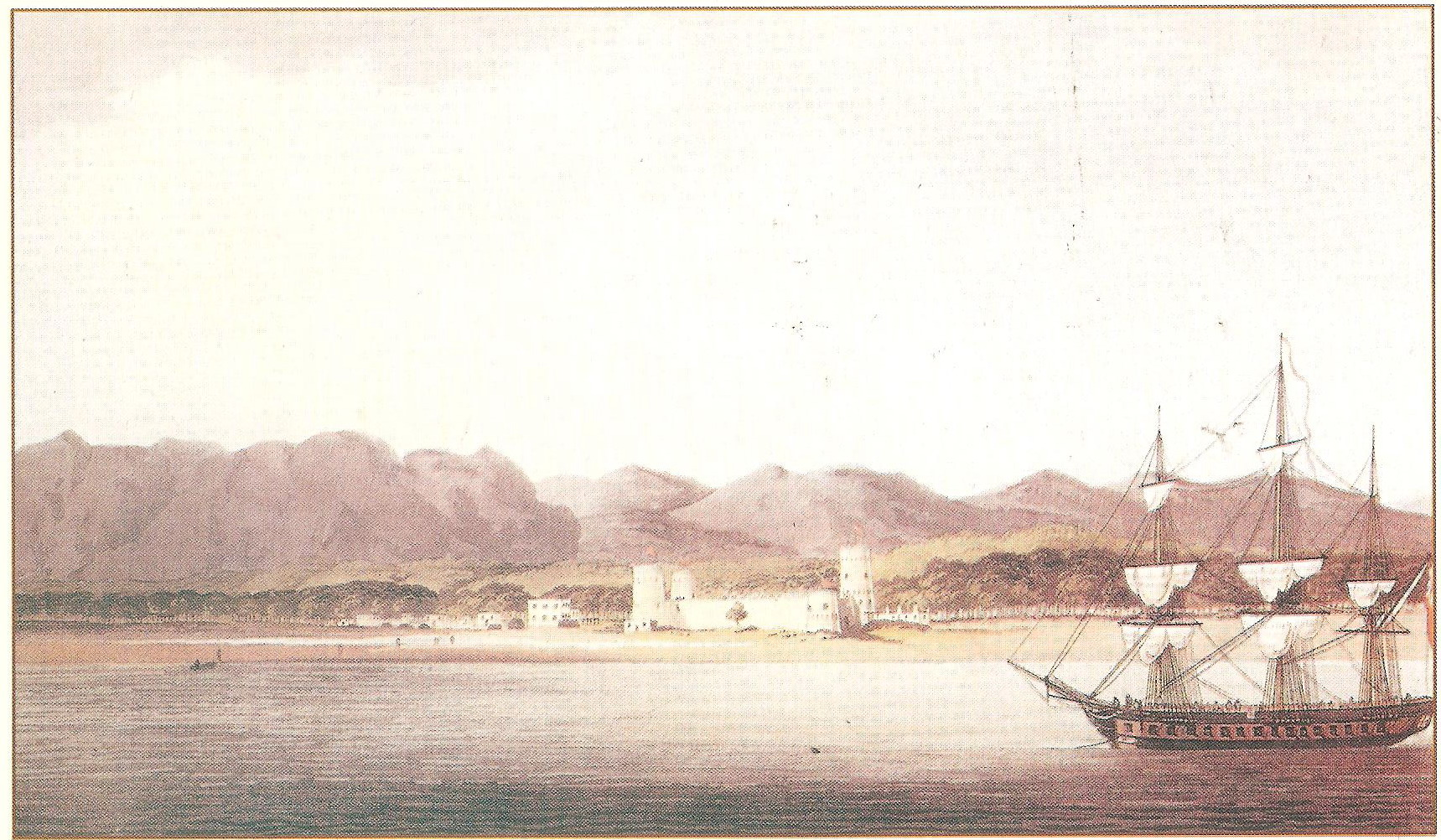 صورة لسفينة بريطاني تهاجم مدينة بندر عباس